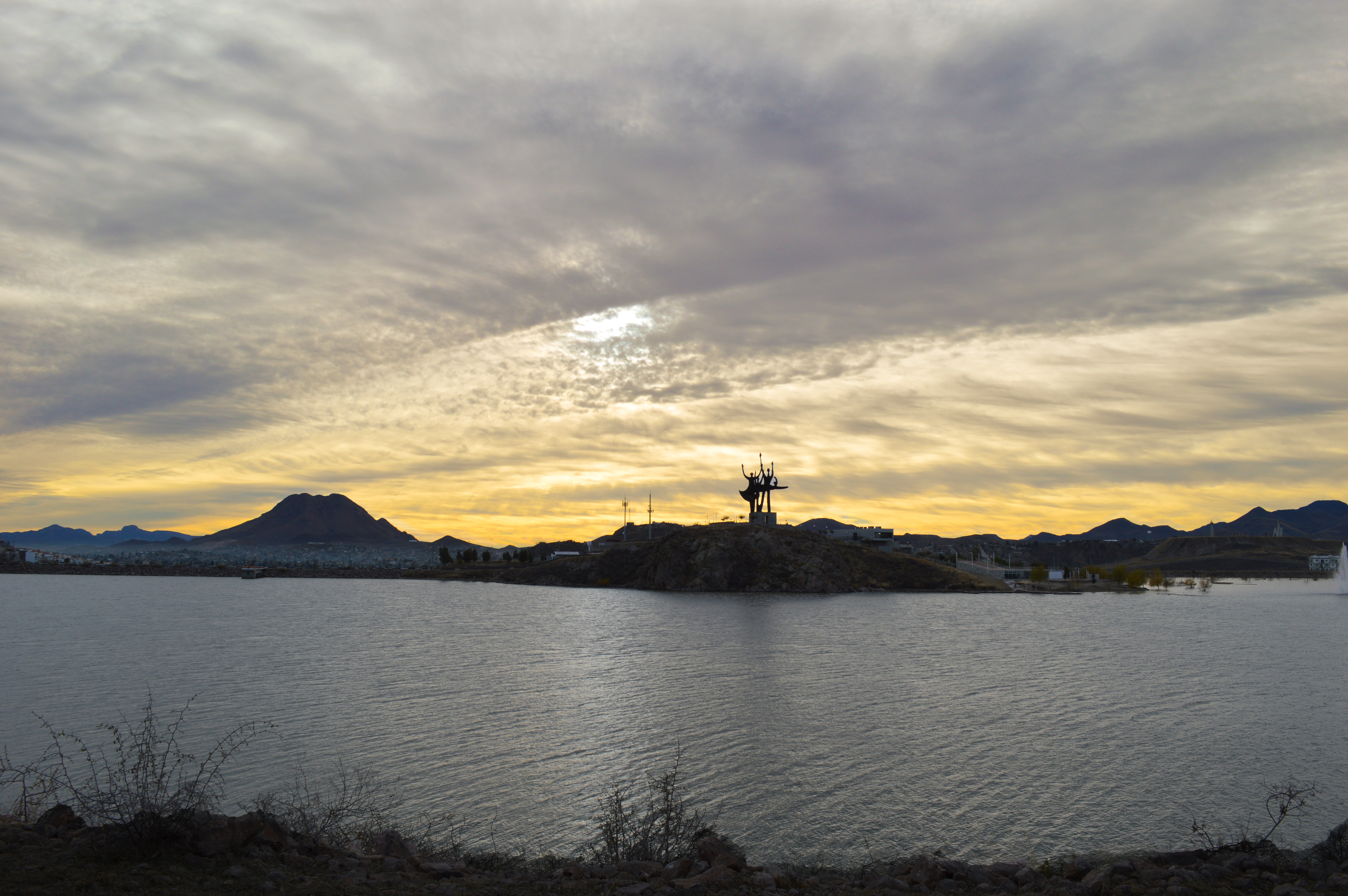 Amanecer en la presa el Rejón Chihuahua